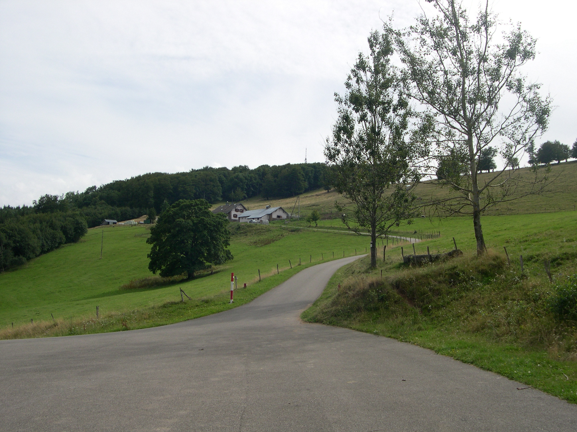 Le Molkenrain dans le massif des Vosges ( Haut-Rhin). Vue sur la Ferme-Auberge